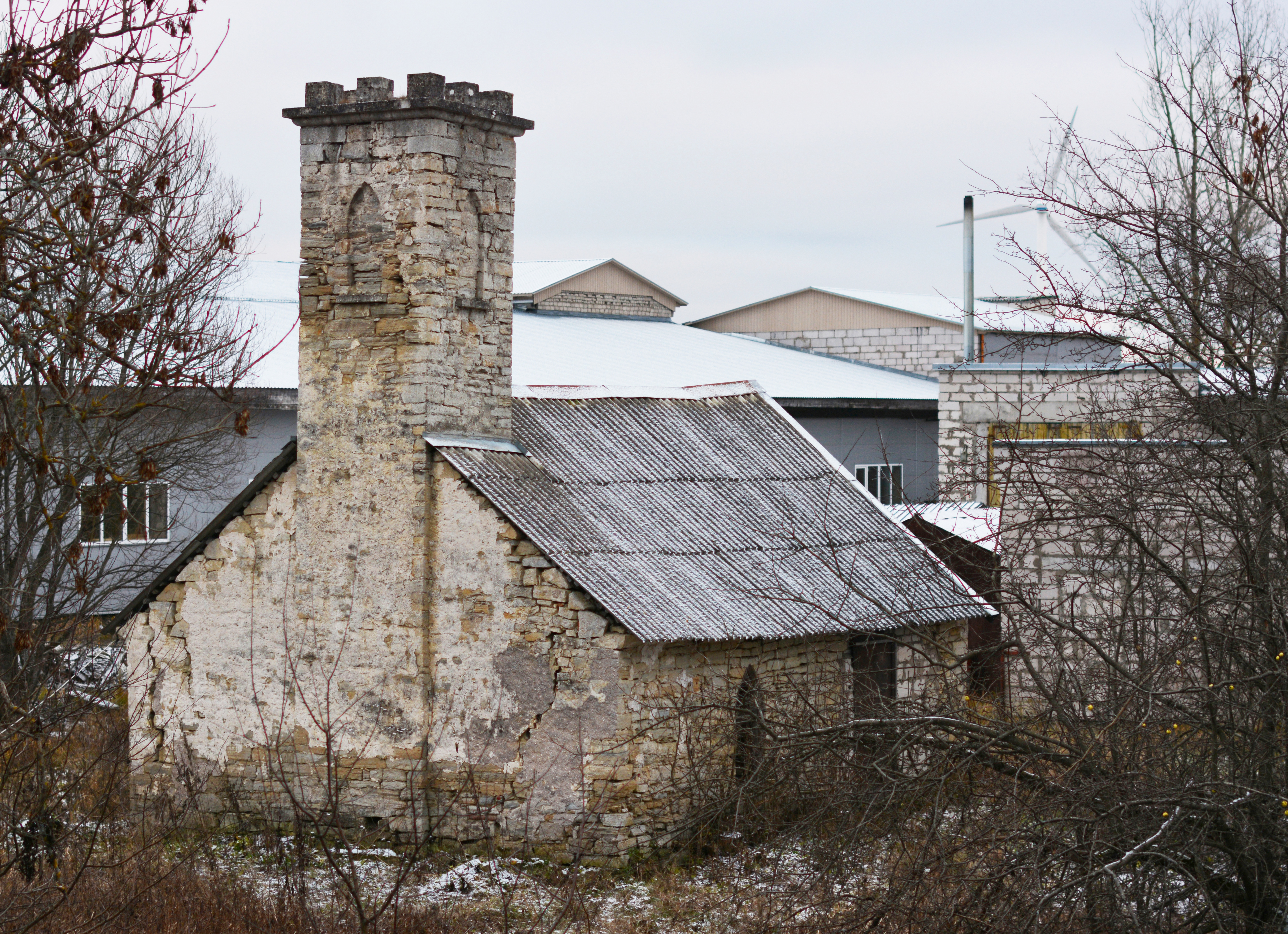 Neogooti stiilis Sikassaare mõisa sepikoda on viilkatusega paekivihoone, mida ehib miniatuurne kreneleeritud rinnatisega torn.